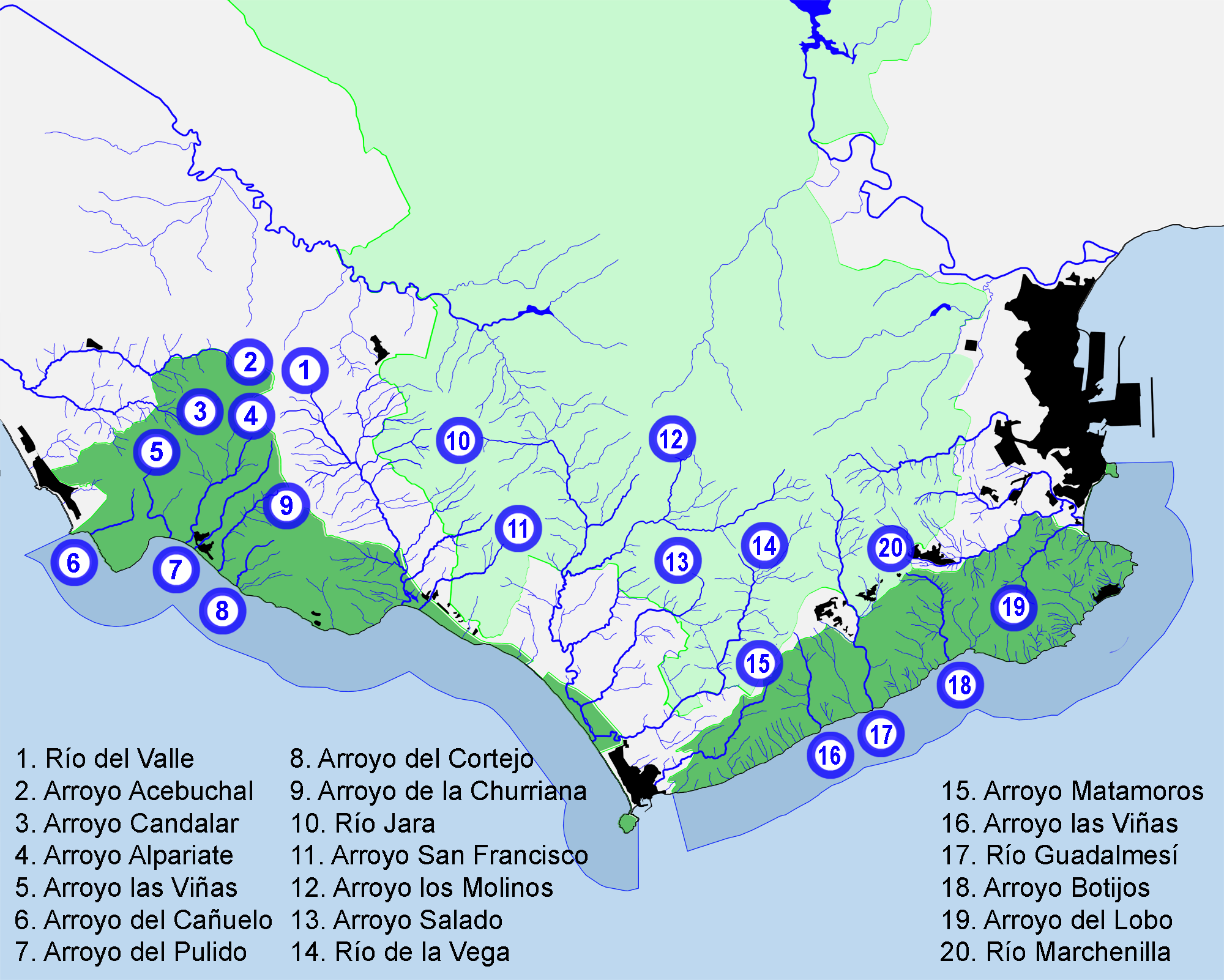 Mapa hidrográfico del Parque natural del Estrecho.